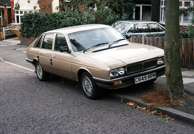 LanciaC849RPNin1989Front